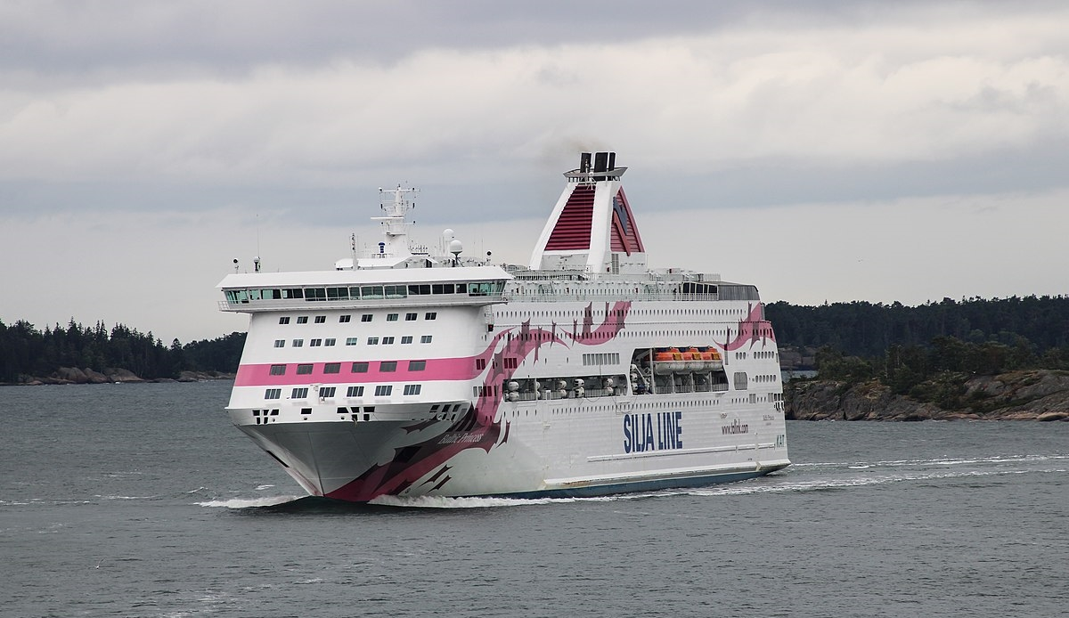 taget den 07-09-19